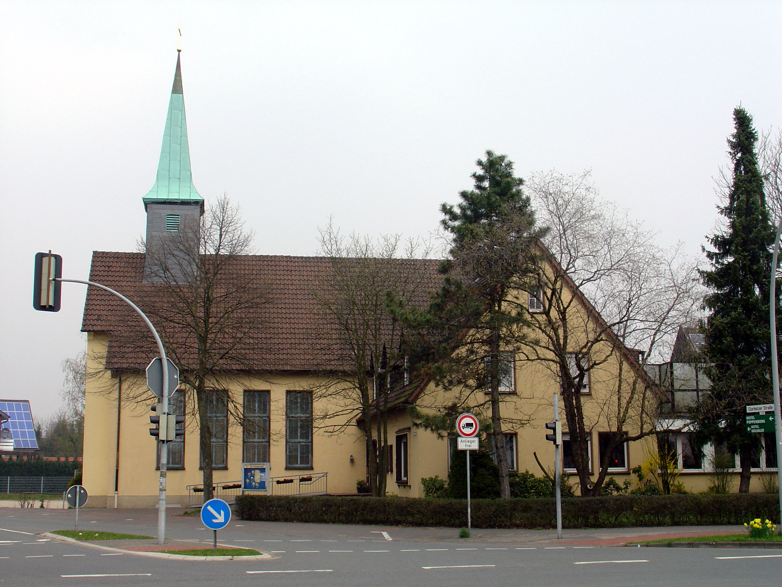 Marin-Luther-Kirche Harsewinkel